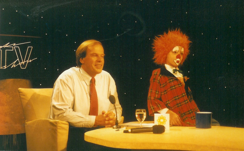 Ivo Niehe with a clown from Circus Herman Renz.